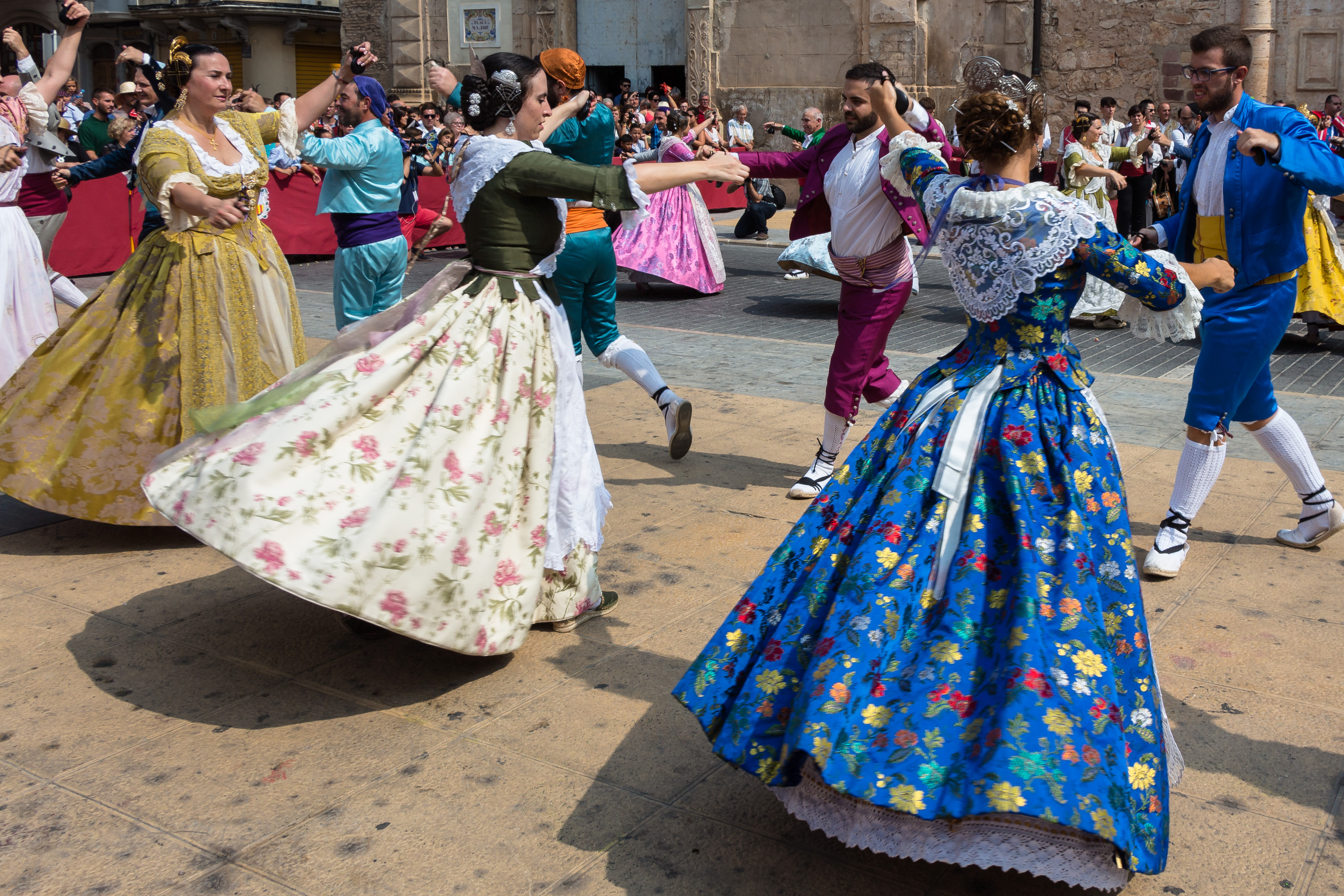 Les Llauradores (o El Bolero) es el baile más moderno de la fiesta, apareciendo a principios del siglo XX. This is a photography of a Folklore festival in Spain (Wikidata id Q3290365).